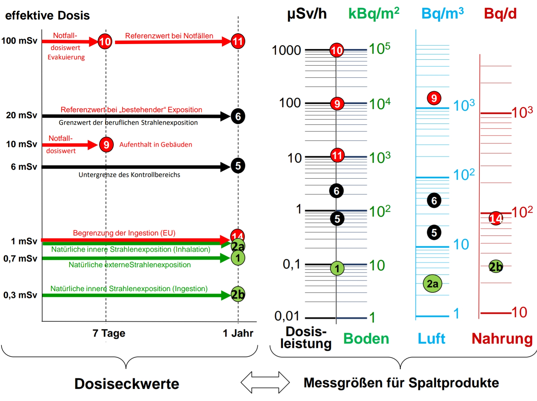 Dosisgrößen werden durch Messgrößen repräsentiert